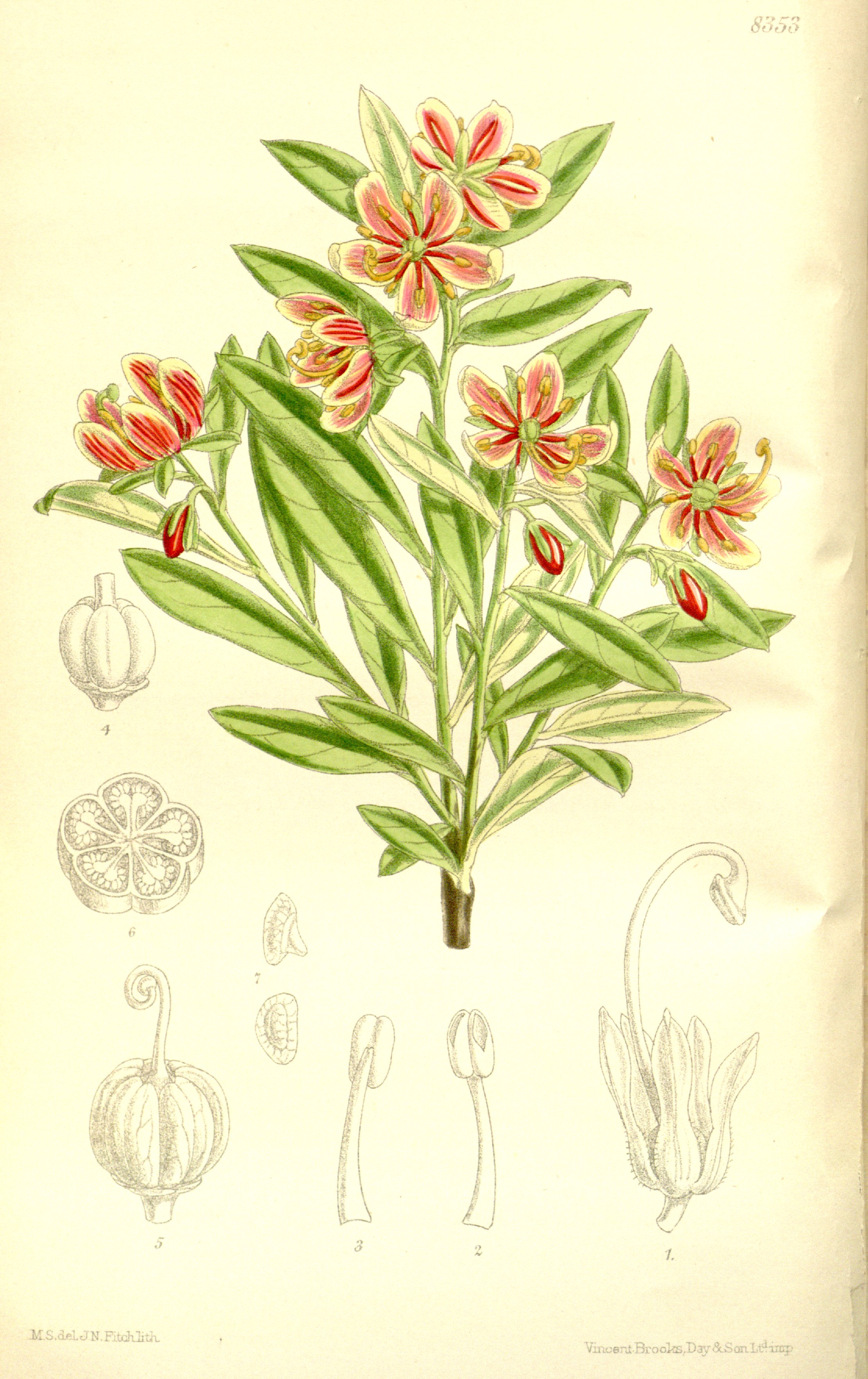 Cladothamnus pyrolaeflorus (= Elliottia pyroliflora), Ericaceae